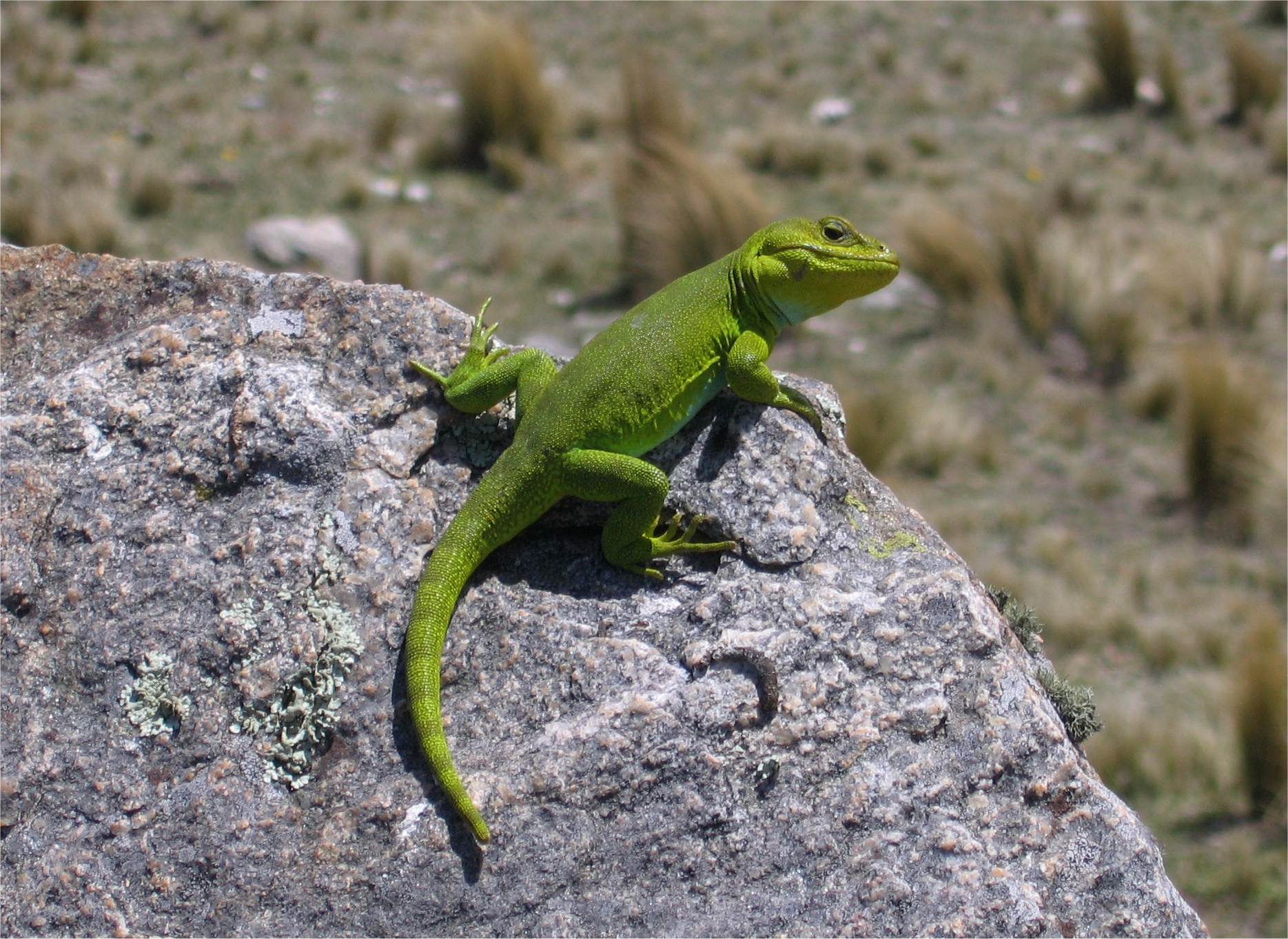 Ejemplar de Pristidactylus Achalensis. Pampa de Achala, Provincia de Córdoba, R. Argentina. 2007-10-12, 13:20 Hora Argentina.